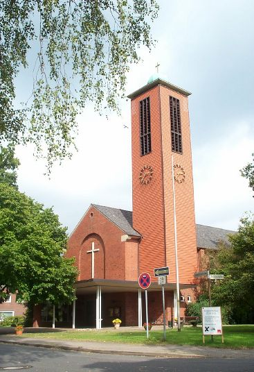 Erlöserkirche Halstenbek